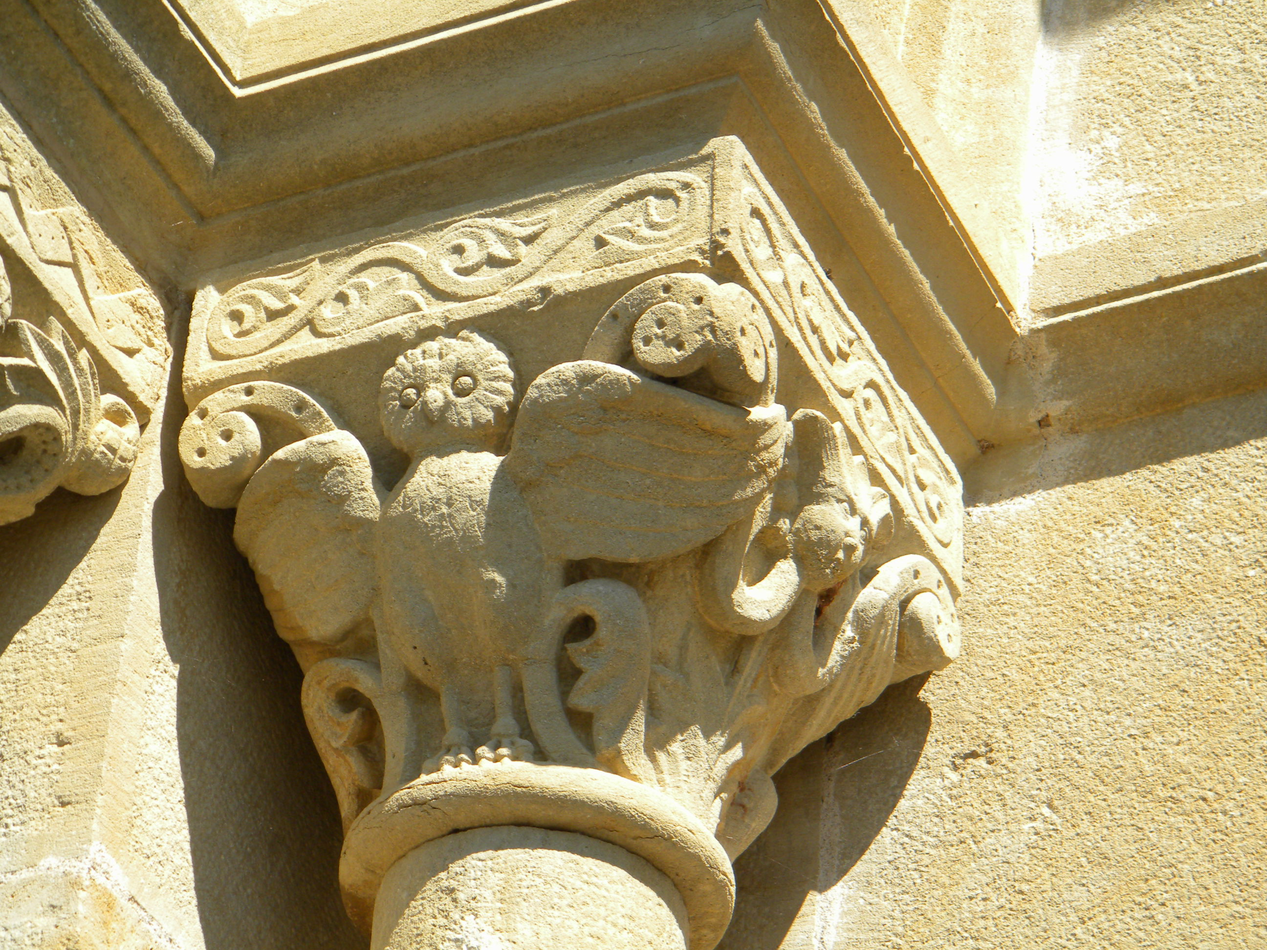 Eglise Saint-Saturnin de Vauban (Saône-et-Loire), chapiteau